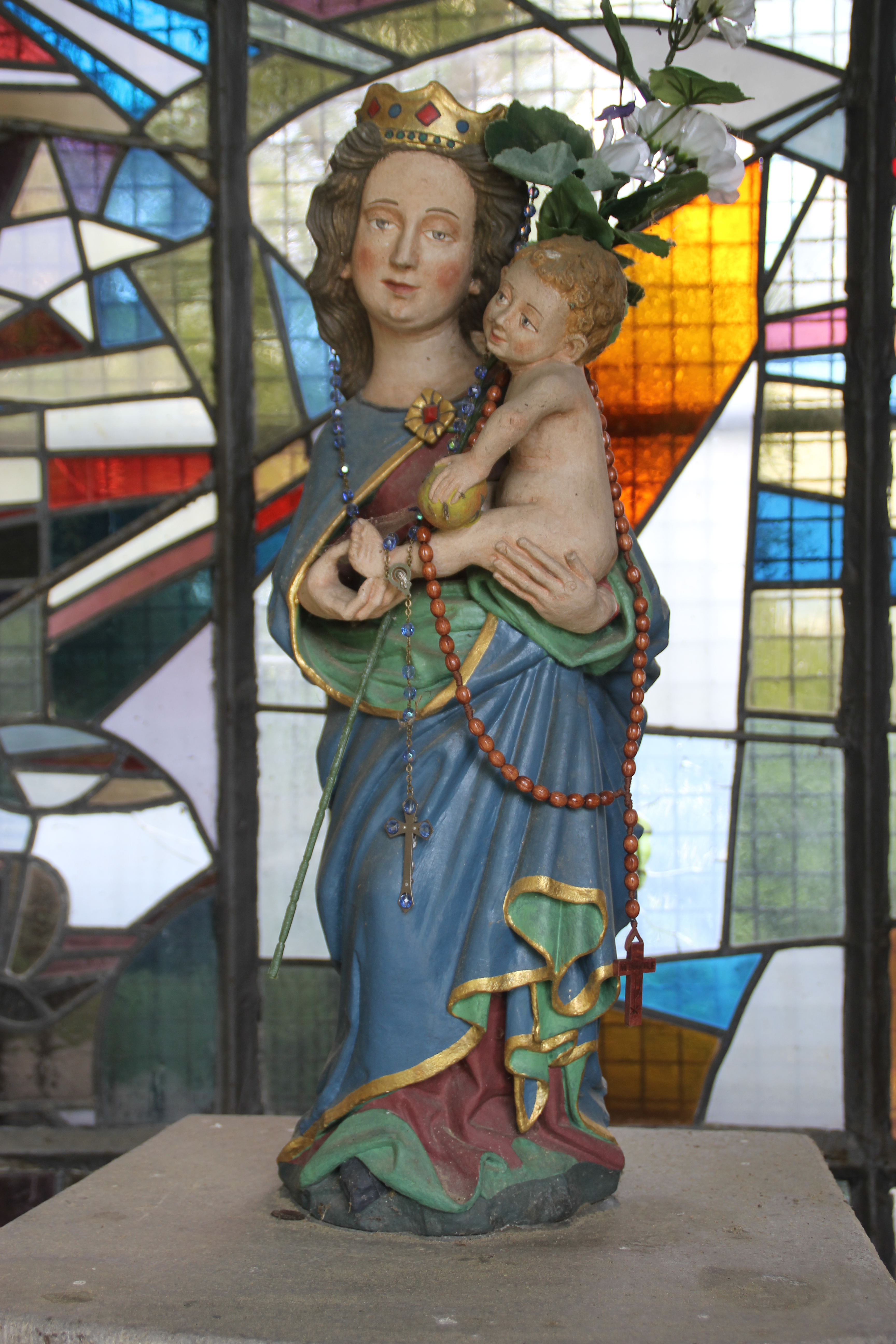 Die Muttergottesstatue in der Marienkapelle bei Mainaschaff